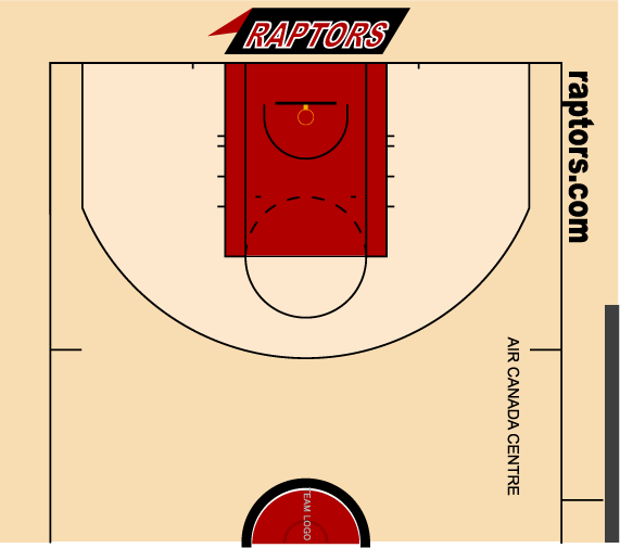 ラプターズホームコート配色